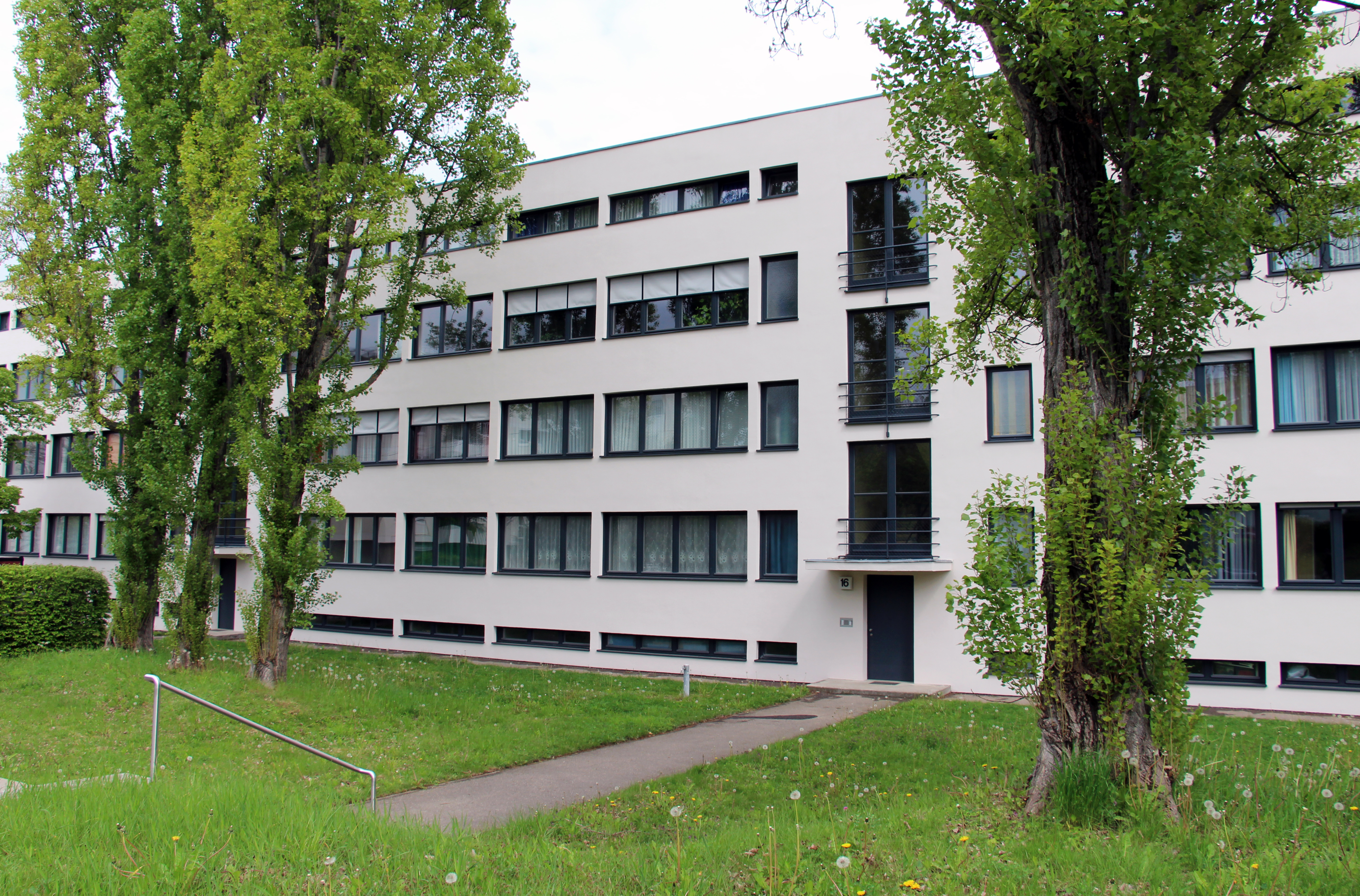 Am Weißenhof Functionalism. Arch. Ludwig Mies van der Rohe 1927